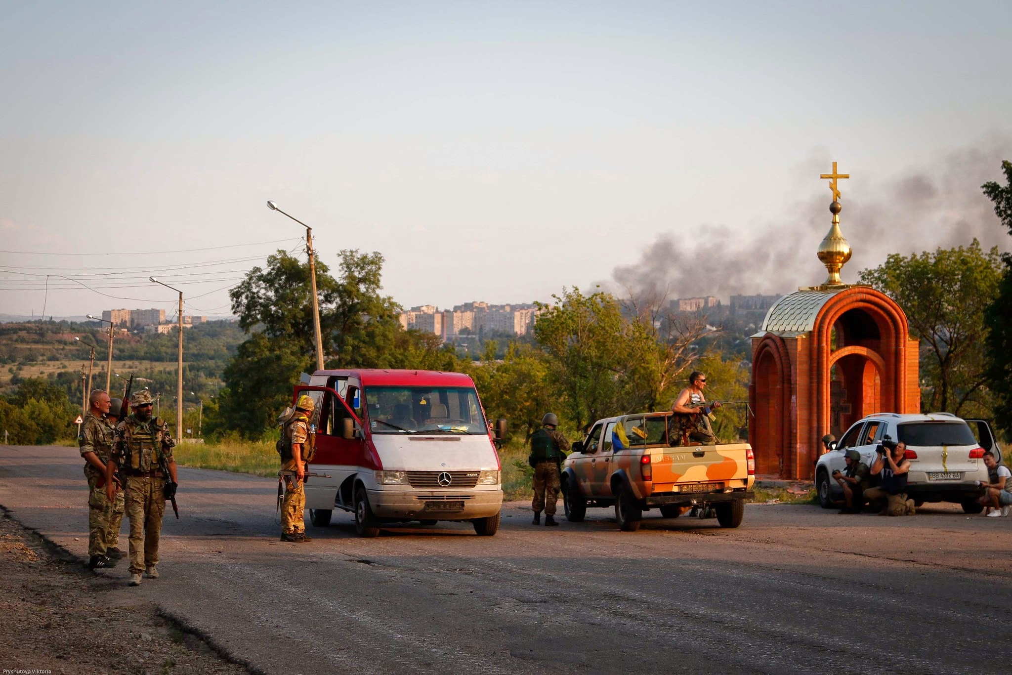 Батальон «Донбасс» под Первомайском